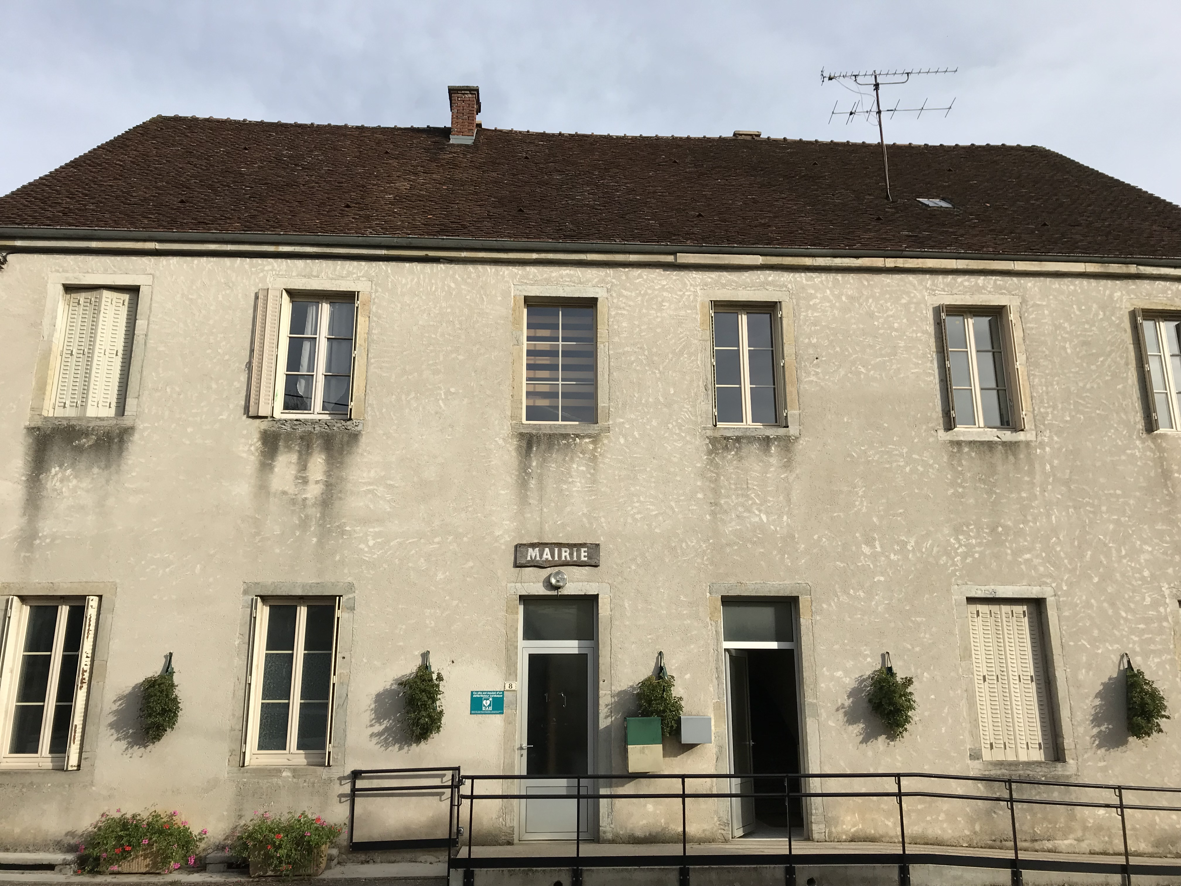 Loisia (Jura, France) en octobre 2017.